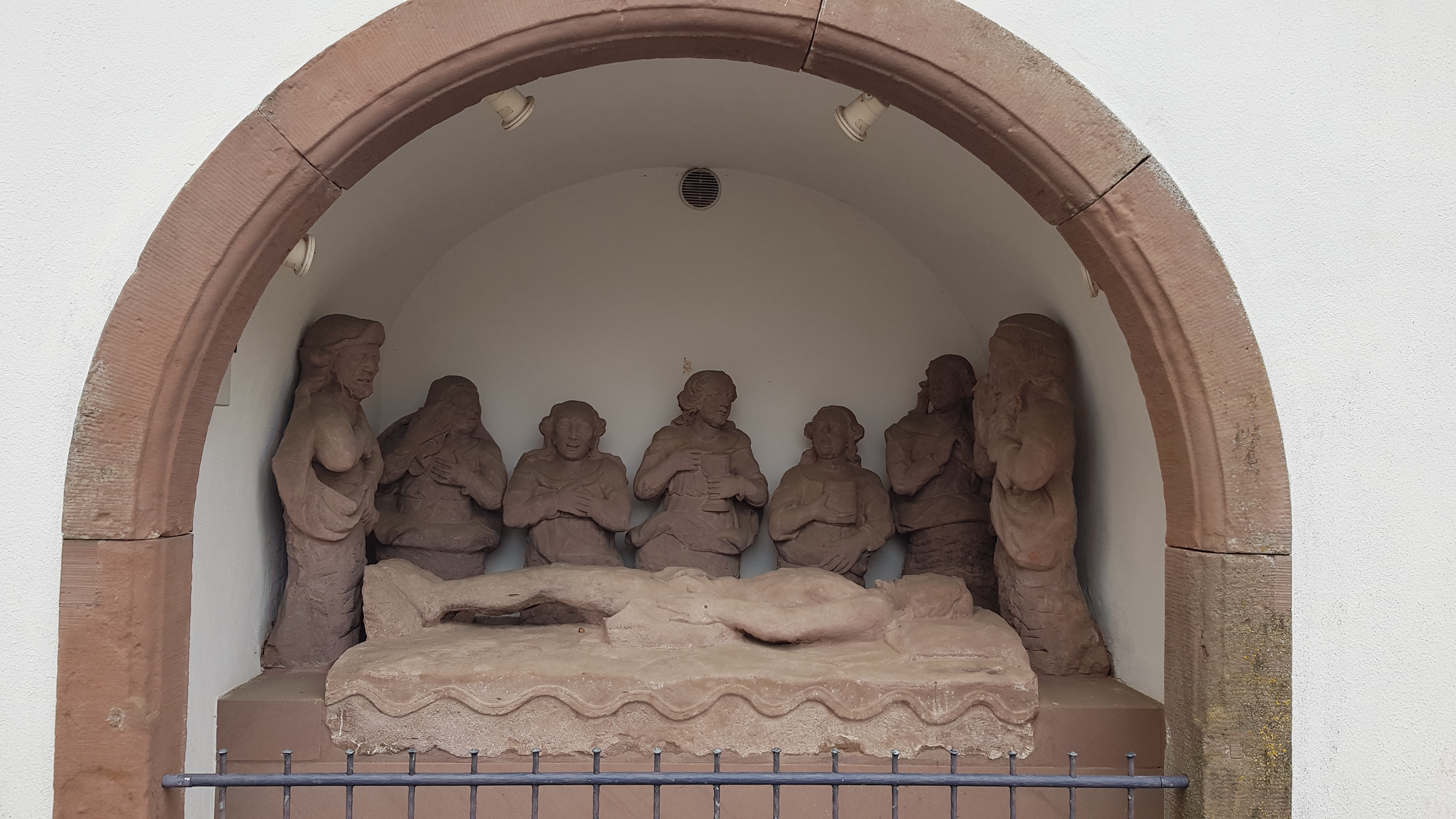 Kreuzweg, Manderfeld, Büllingen, Belgien This photo of immovable heritage has been taken in the Walloon Region